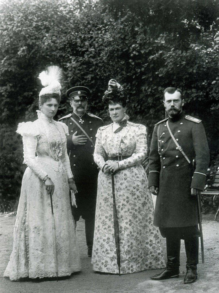 Николая II и великий князь Владимир Александрович с женами